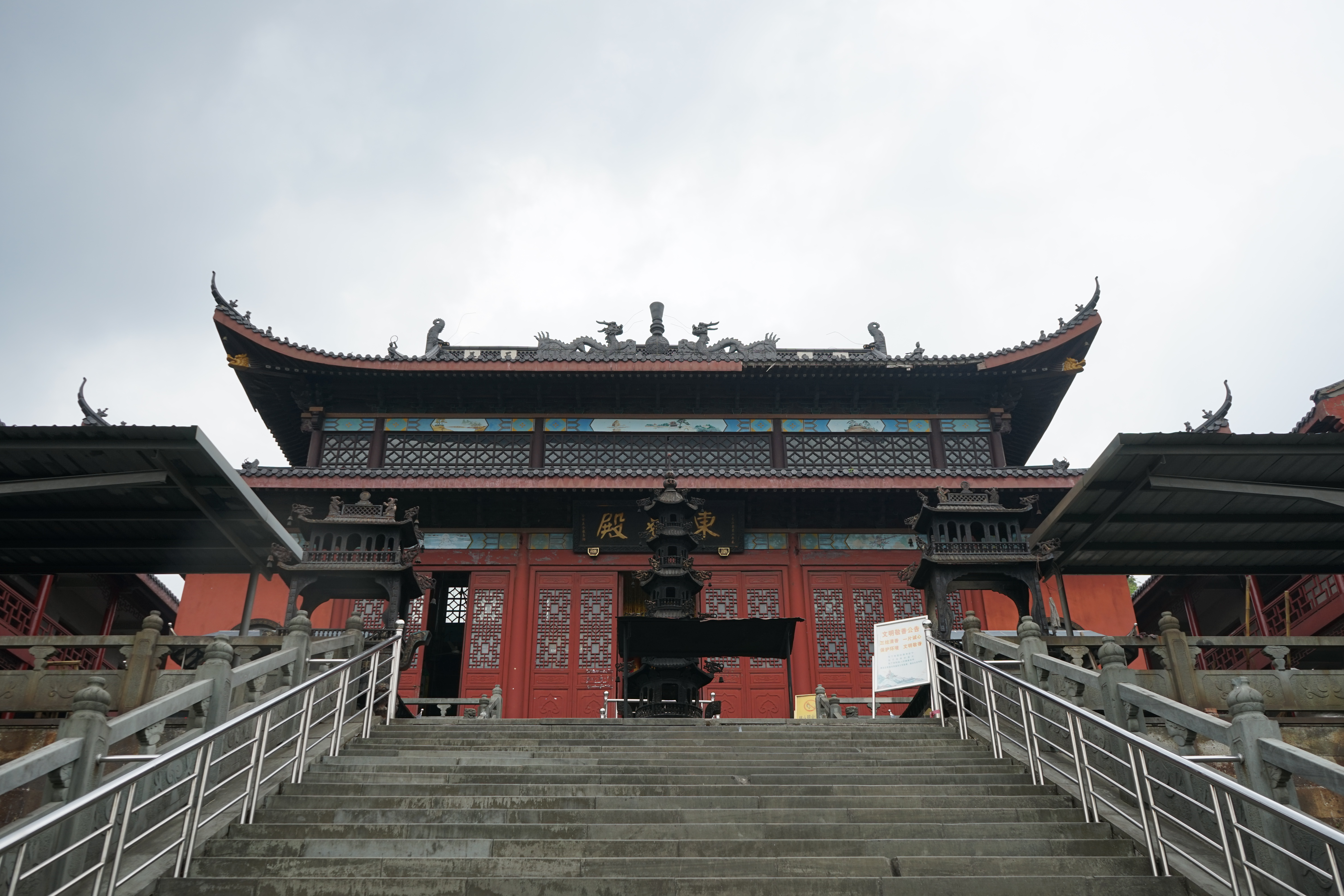 中文（中国大陆）: 衙前镇东岳庙·东岳殿